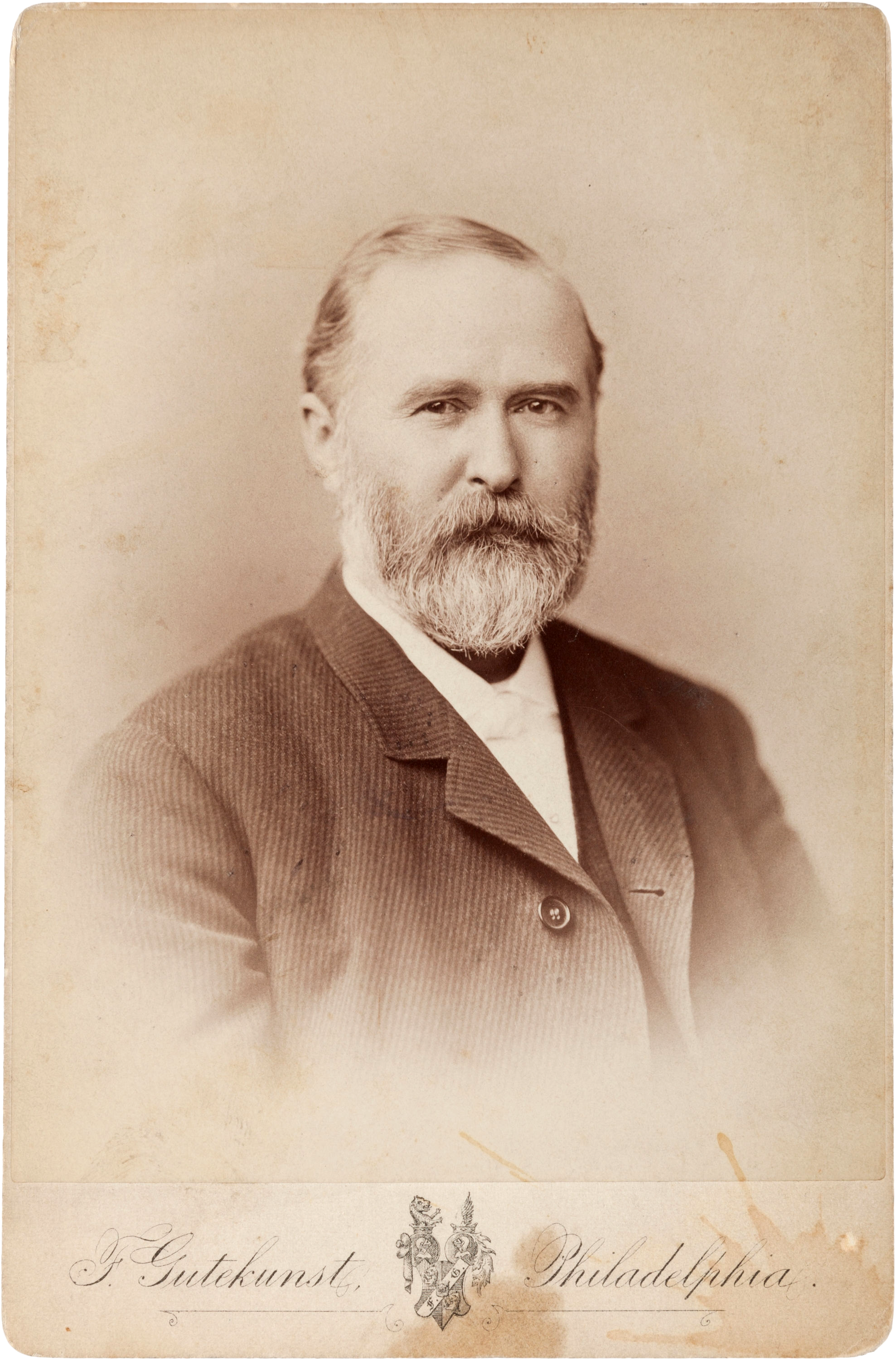 John Batterson Stetson Cabinet Card